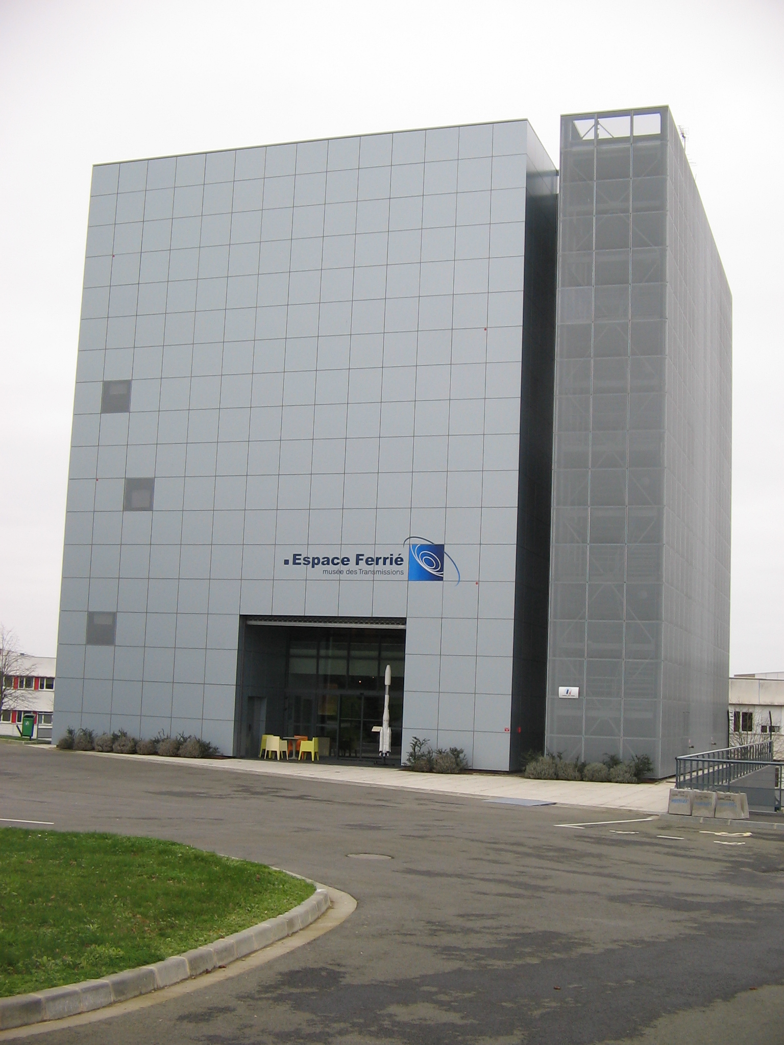 Le musée des transmission/ Espace férié à Cesson-Sévigné